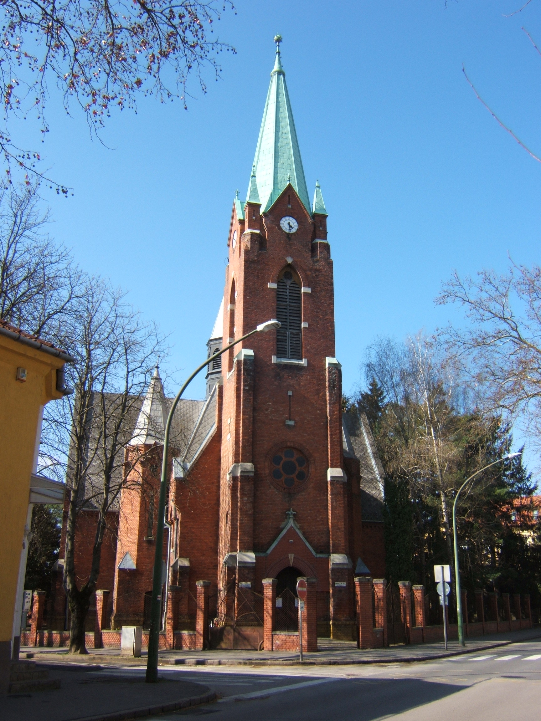 A kaposvári református templom 2016-ban